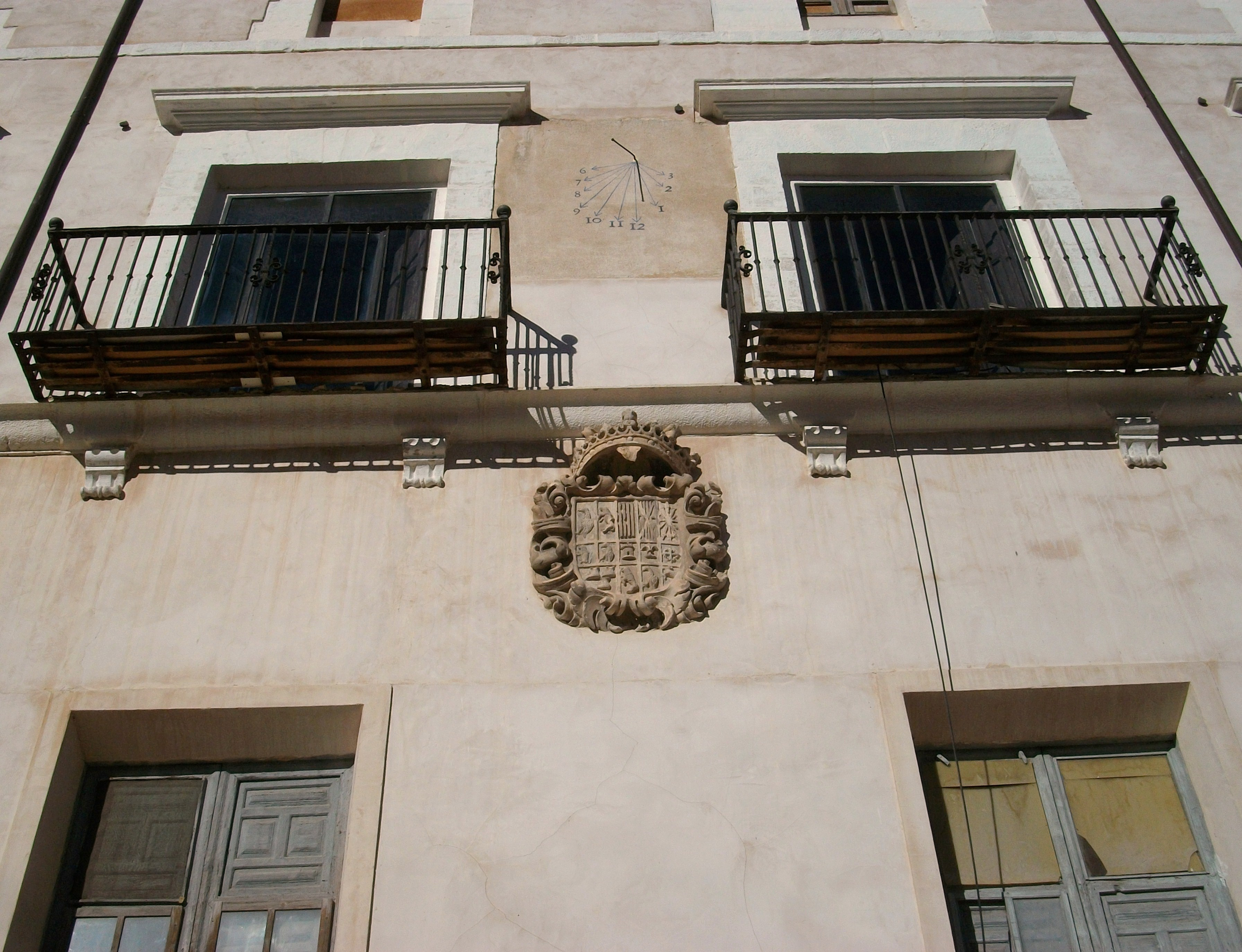 Rellotge de Sol, balcons i escut del palau dels Milà i Aragó, Albaida.